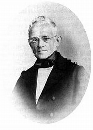 Bildnis des Schuldirektors Wilhelm Friedrich Volger (1794-1879) am Johanneum Lüneburg